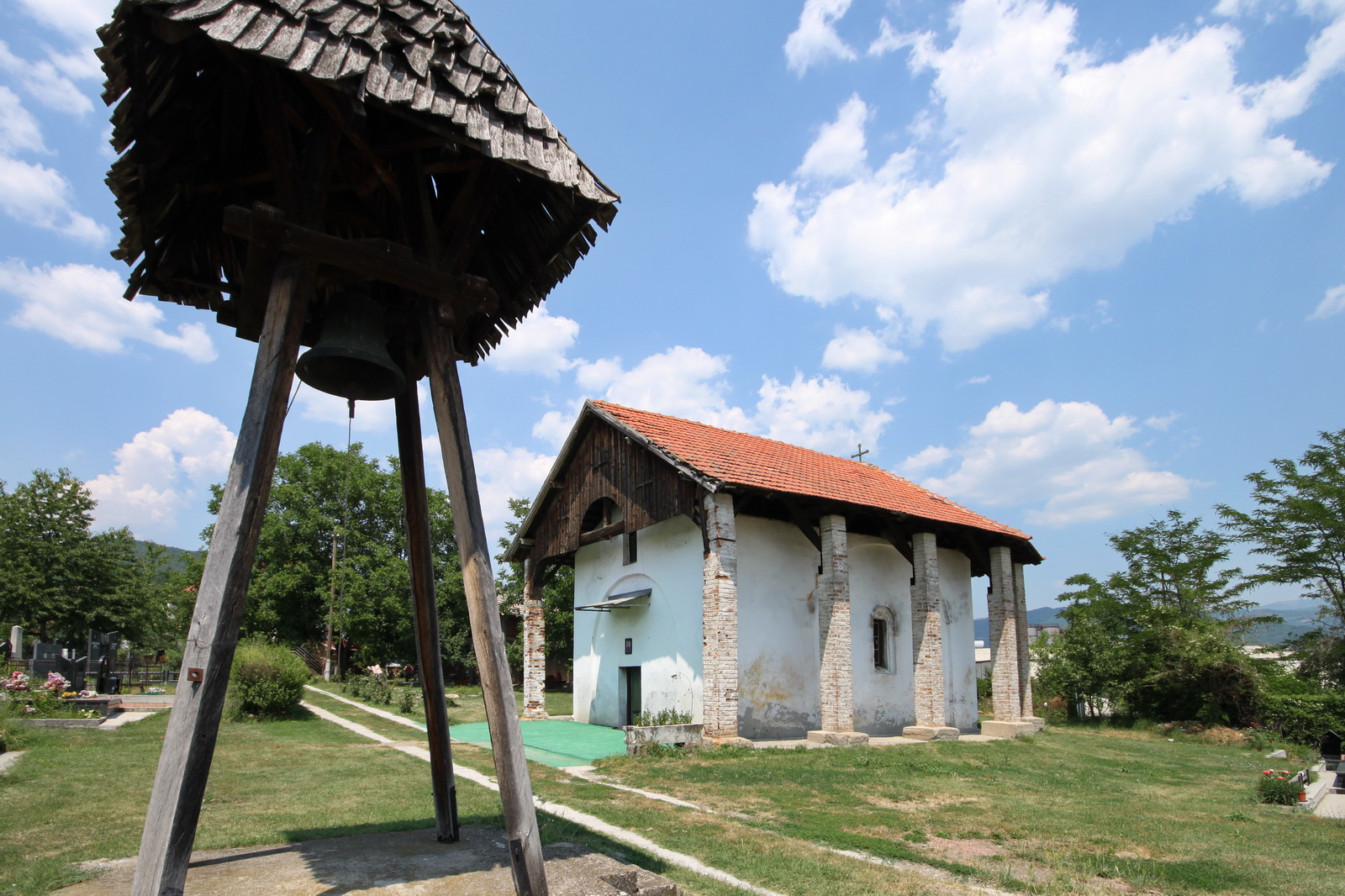 Srednjevekovna srpska crkva